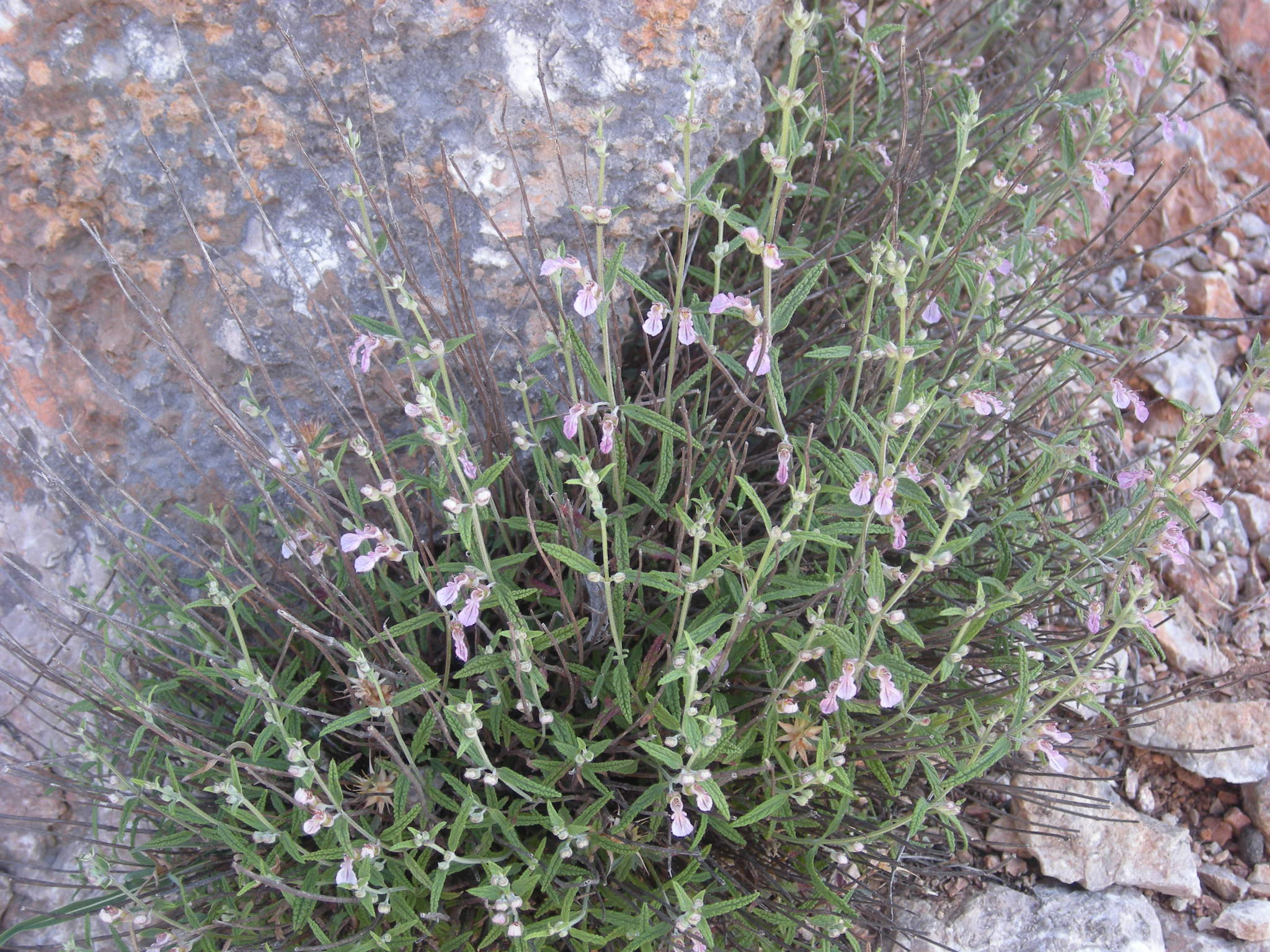 Brutònica (Teucrium asiaticum). Puig Major, Mallorca.